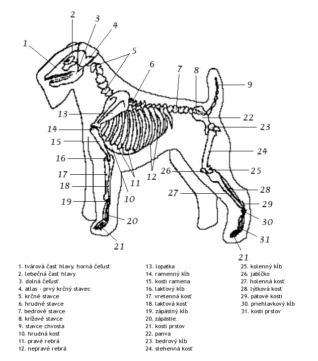 Popis: Kostra psa Zdroj: Vlastný obrázok (prekreslené podľa obrázku z knihy: Dostál, J.: Genetika v kynologické praxi. Dona, České Budějovice, 1995, ISBN 80-85463-58-X) Dátum: 31.12.2005 Autor: Prskavka Povolenie: PD Iné verzie tohto súboru: nie